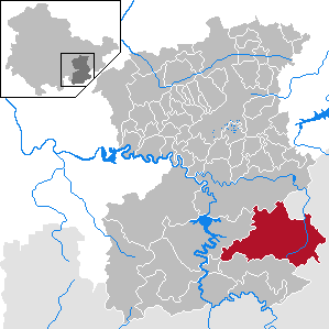 Tanna in Thuringia - Saale-Orla-Kreis